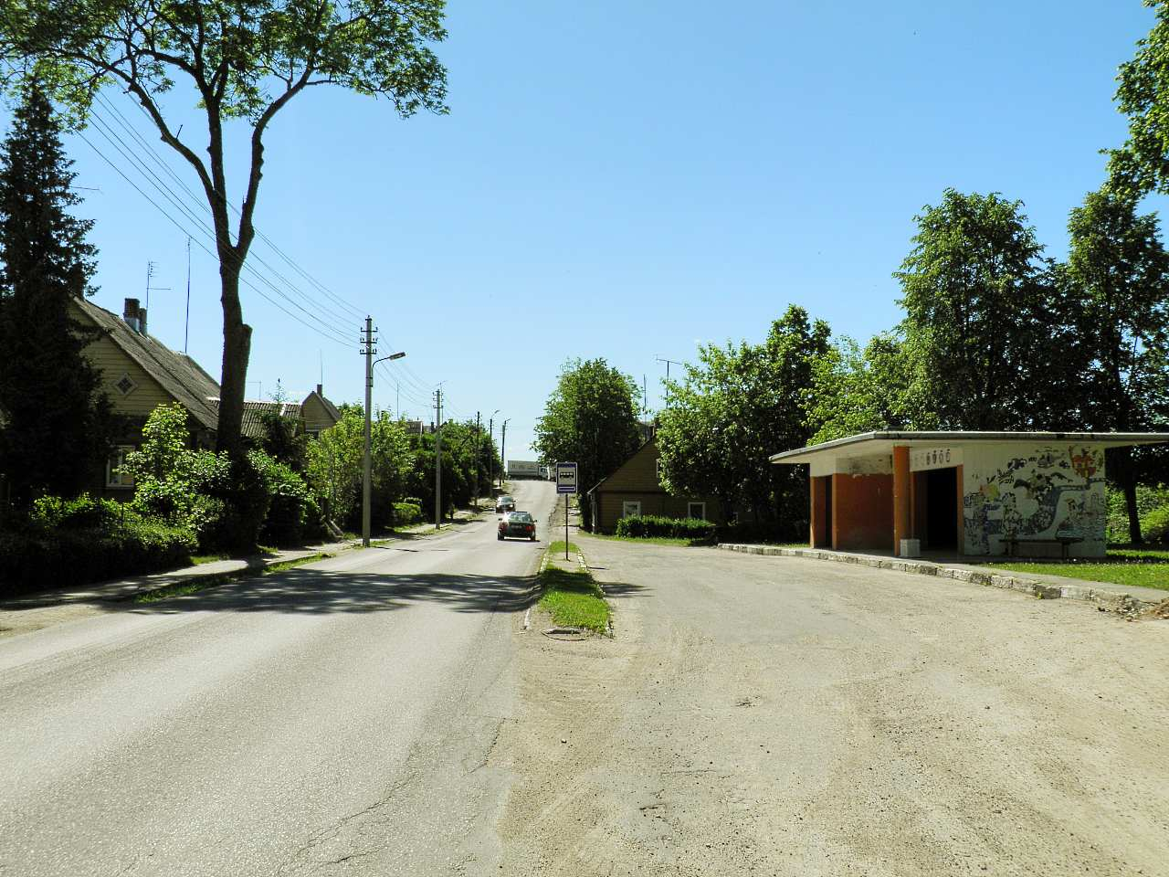 Город Обяляй